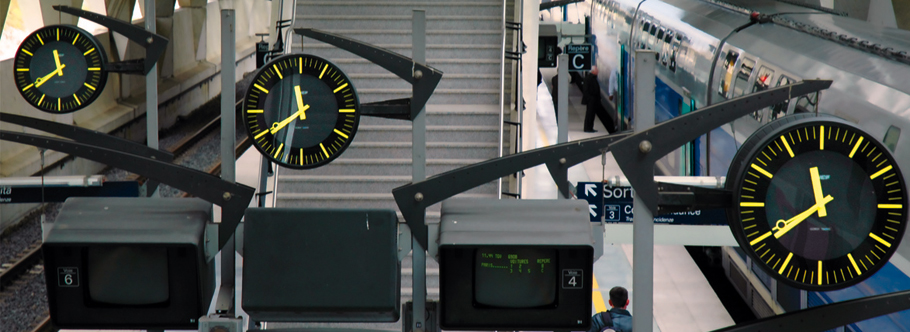 Horloge Gorgy Timing sur un quai de la SNCF